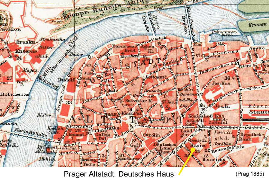 Kartenausschnitt - Stadtplan von Prag, Lage des Deutschen Casino, später Deutsches Haus.